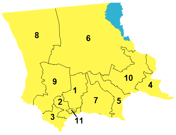 Административная карта Жамбылской области Казахстана